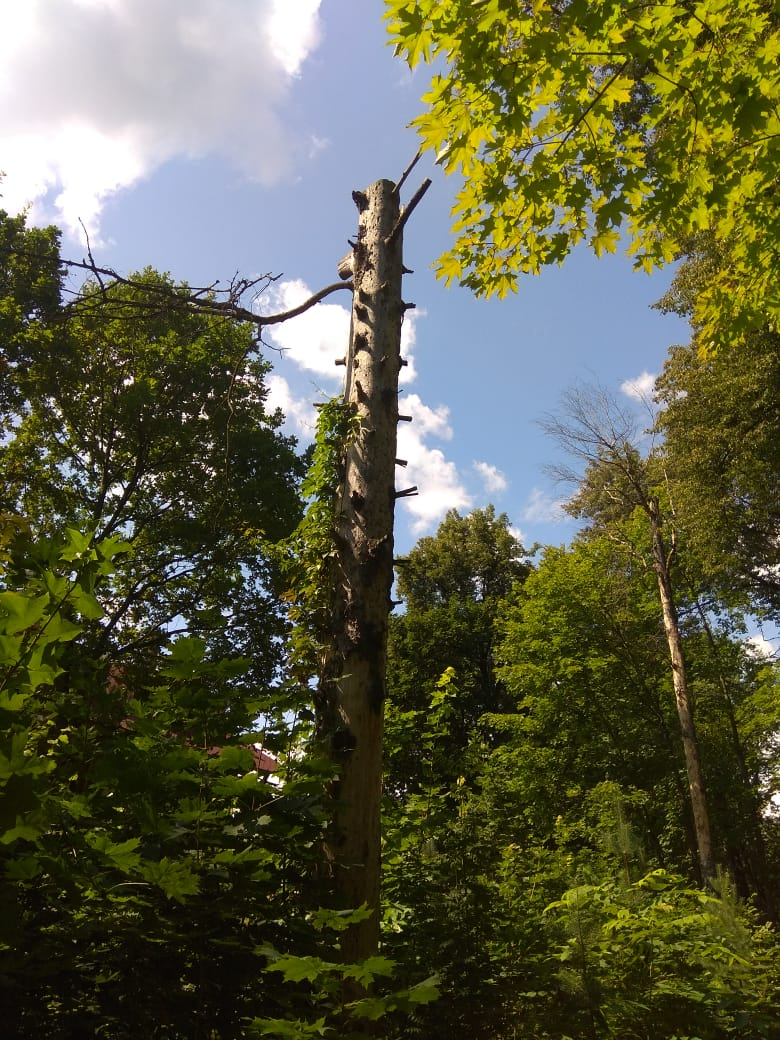 Деревья в усадьбе Опалиха-Алексеевское